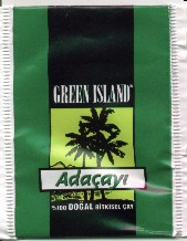 Turkish sage tea bag